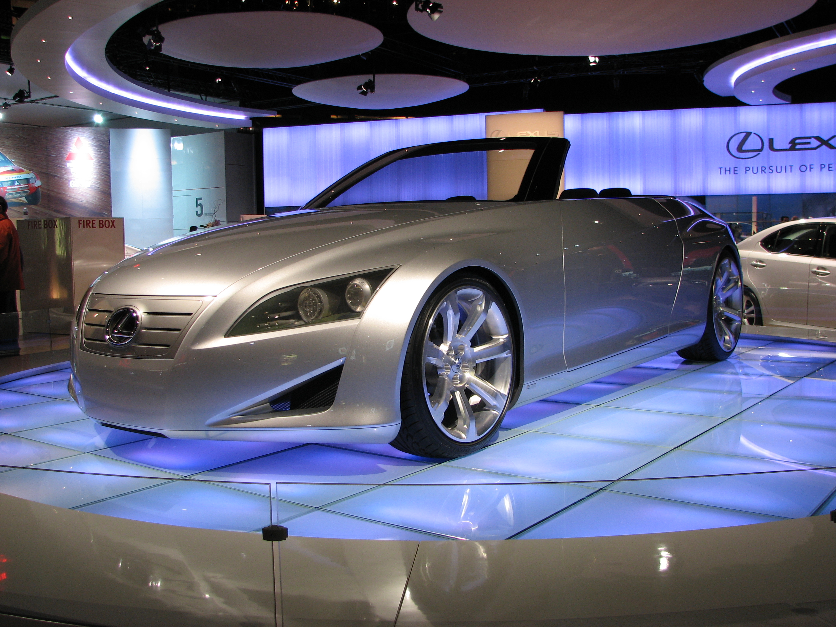 Lexus LF-C concept